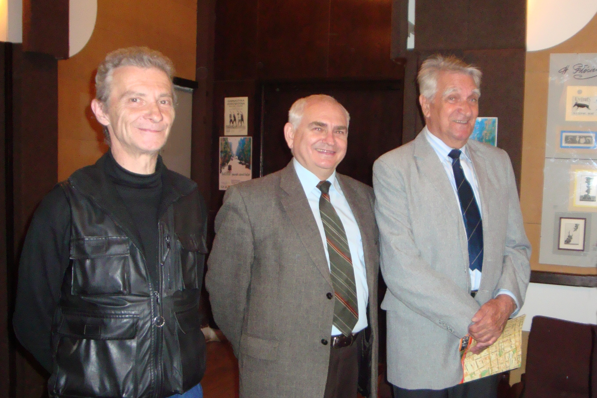 Ryszard Bandosz (w środku) i Henryk Górski (po prawej) na otwarciu wystawy ekslibrisów w Widzewskiej Galerii Ekslibrisu w Łodzi 26 września 2008 r. Po lewej stoi Andrzej Zaręba "dyrektor techniczny" Galerii